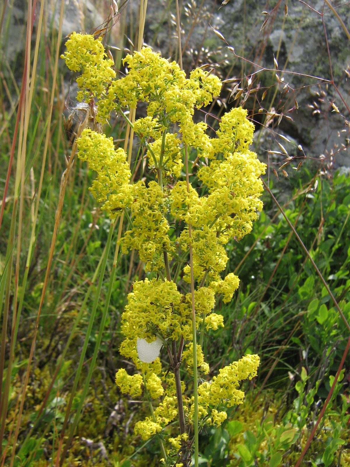 Galium verum (Aubrac, Massif central, France)